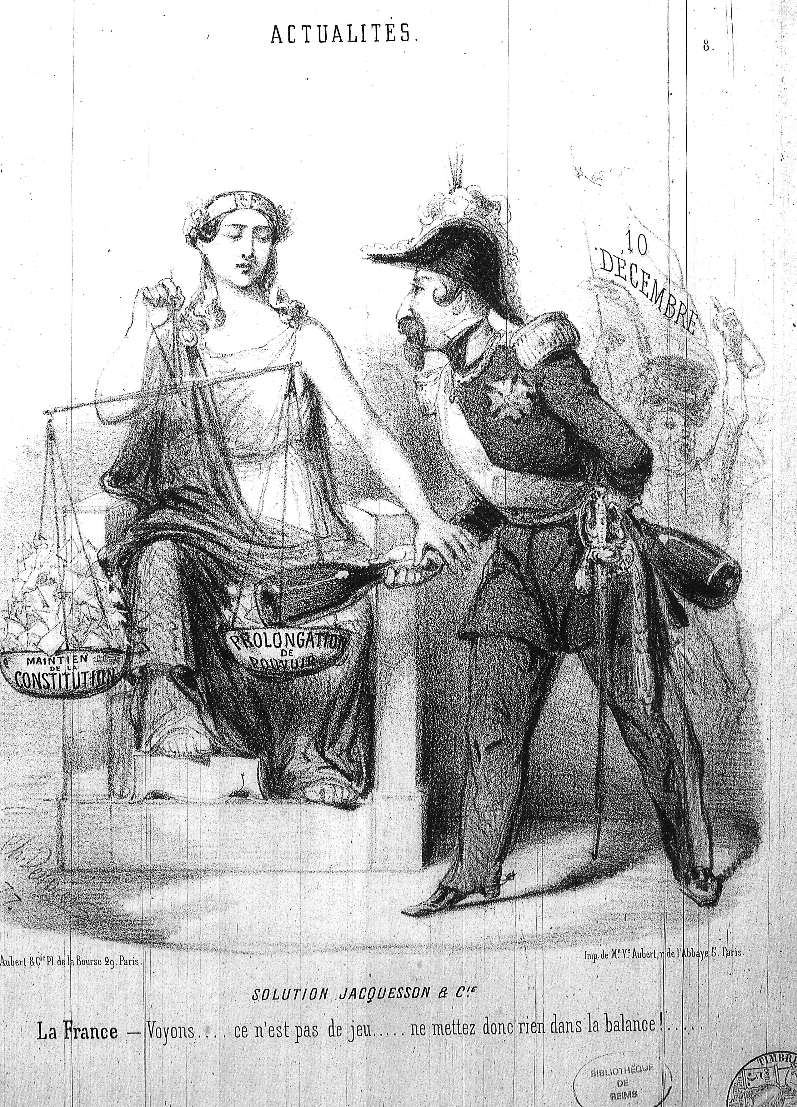 issu du fond iconnographique de la bilbiothèque de reims.